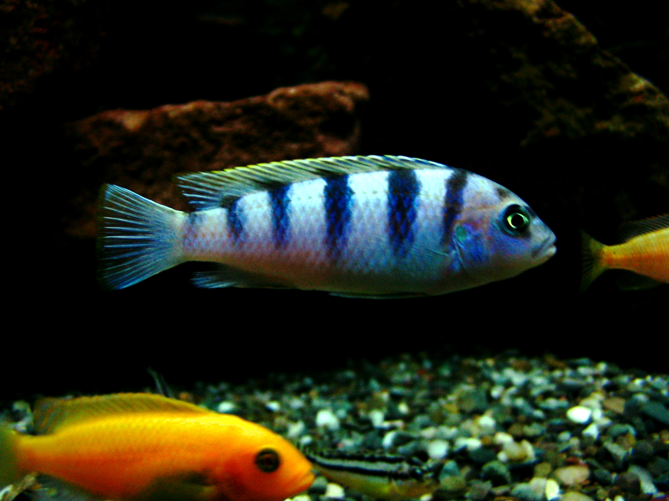 Samiec pyszczaka Maylandia lombardoi femelle and Maylandia Estherae femelle